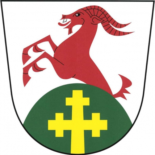 znak, Kozly, okres Česká Lípa